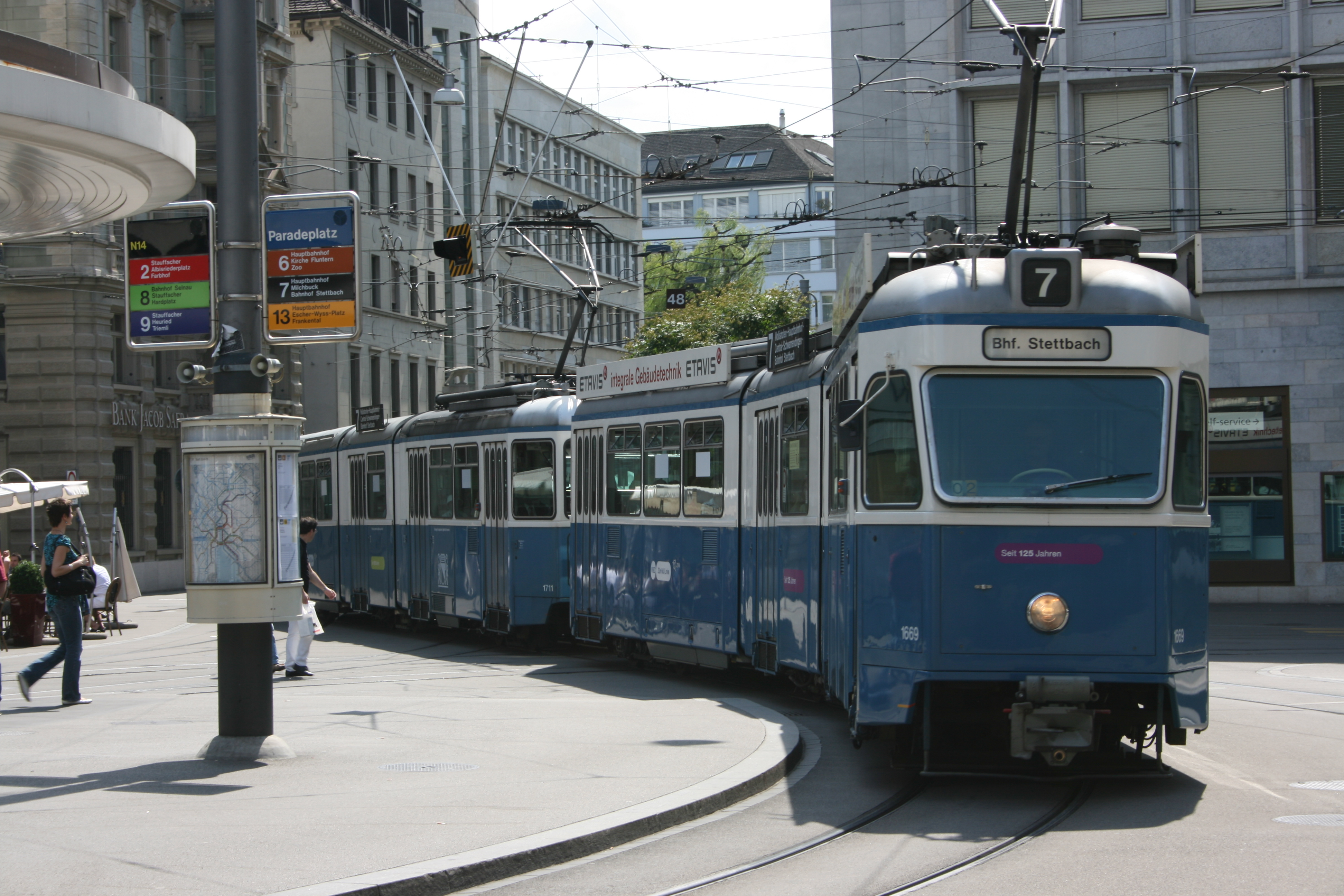 No. 7 Tram, Parade Platz